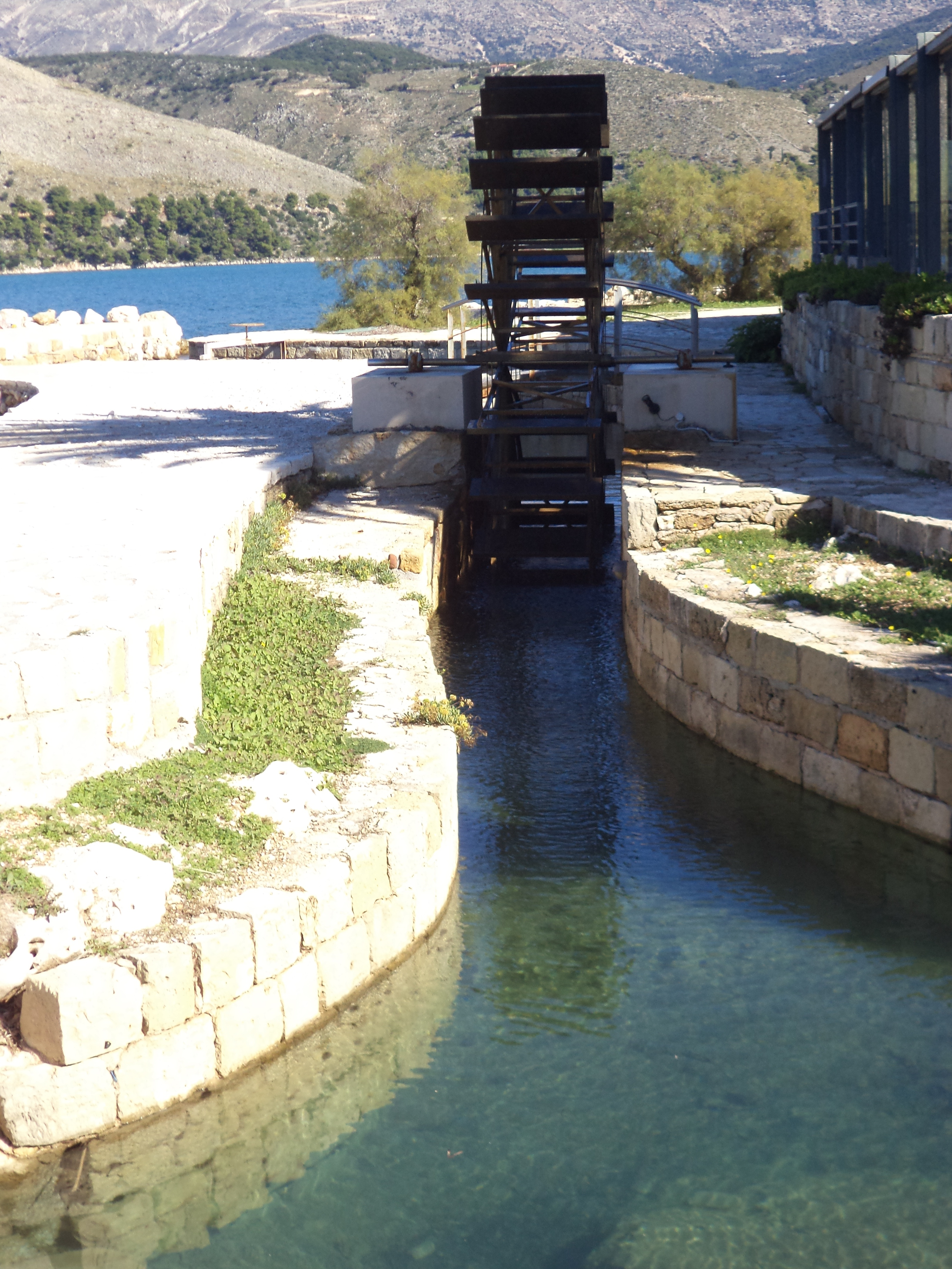 Ο μύλος στις Καταβόθρες. Το νερό καταλήγει μετά από υπόγεια διαδρομή στον Καραβόμυλο και στο λιμνοσπήλαιο της Μελισσάνης (περιοχή Σάμης).